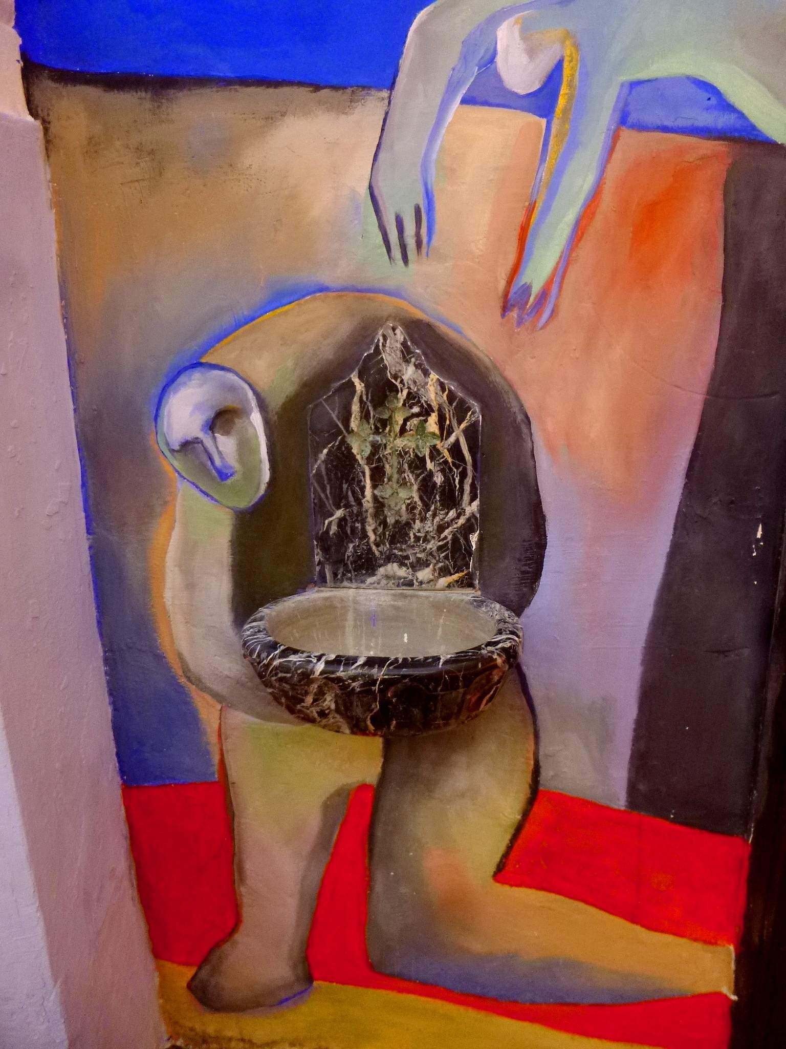 'Pinturas para la vida', proyecto artístico de decoración mural del interior y el pórtico de la iglesia de San Miguel Arcángel de Antezana de Foronda (Vitoria, Álava), realizado por Xabier Egaña entre 2013 y 2017. El autor, discípulo del escultor Jorge Oteiza, desarrolla una profusa iconografía de múltiple inspiración y temática, tanto religiosa como profana, con un estilo figurativo y cromático que recuerda las obras de Marc Chagall y Pablo Picasso.